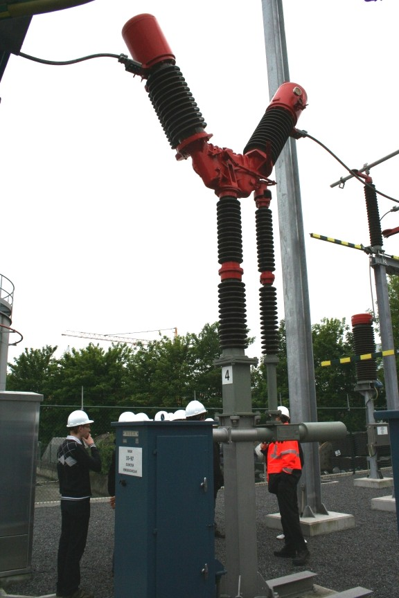 Een oliegevulde vermogenschakelaar op 150 kV, ELIA opleidingspost Edison